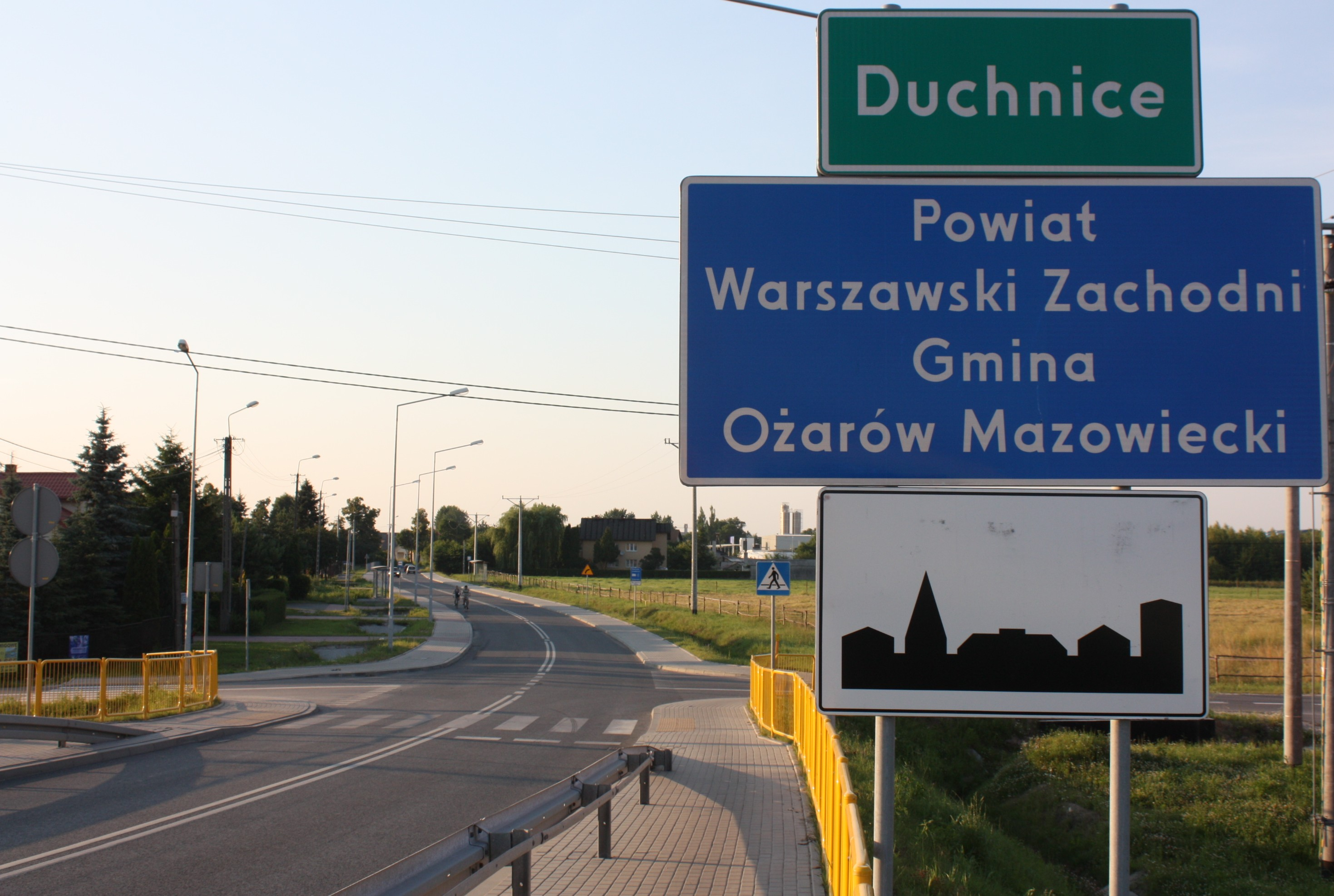 Wjazd do miejscowości od strony Pruszkowa